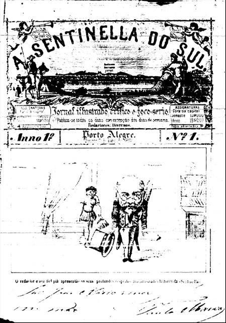 Primeira página do Nº 1 de "A Sentinella do Sul', jornal brasileiro do Rio Grande do Sul.